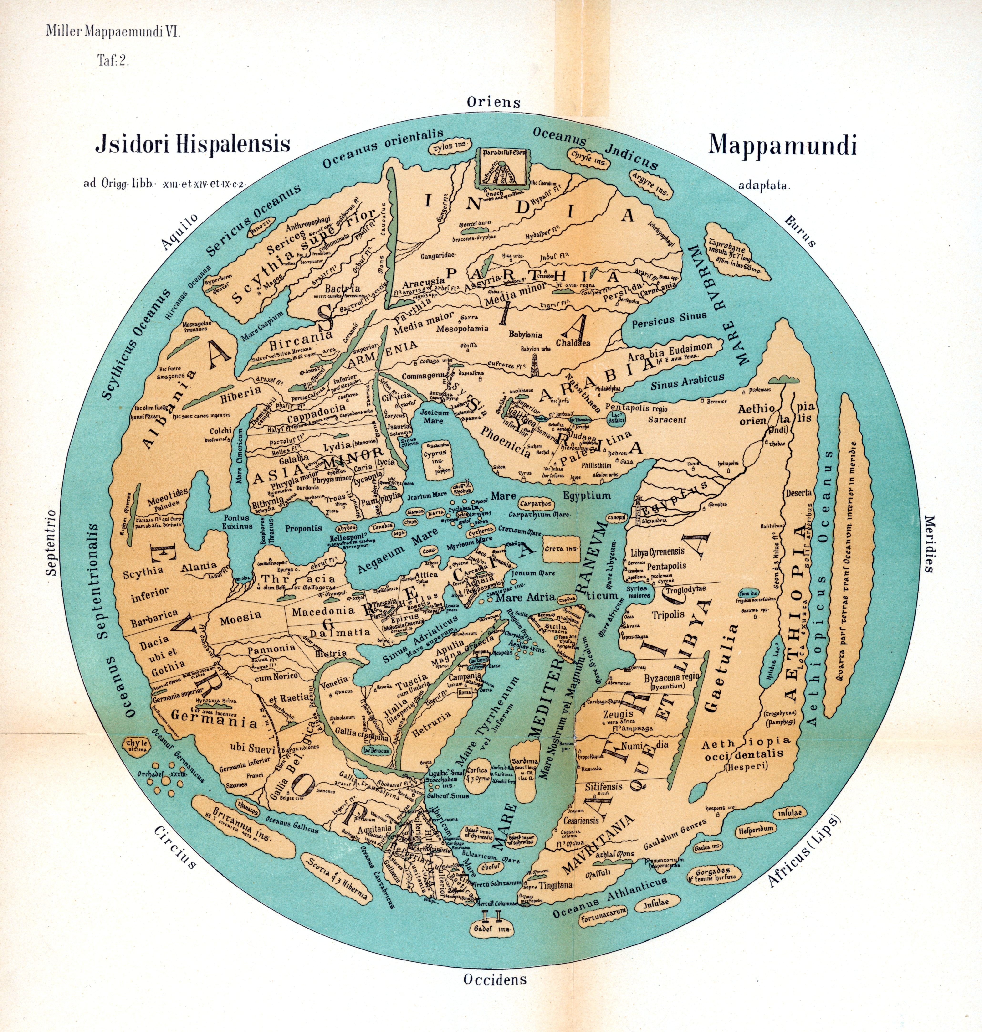 Weltkarte des Isidor von Sevilla